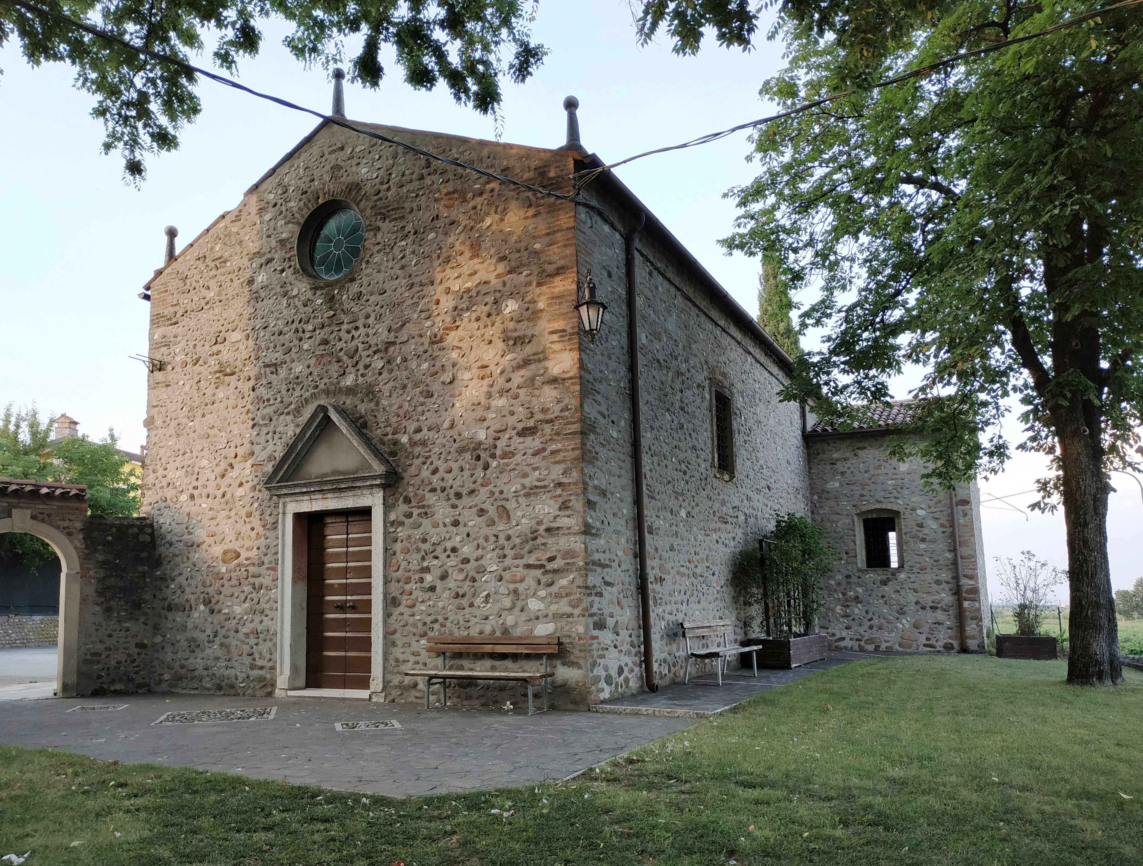 Vista della facciata e della parte laterale destra della chiesa di San Rocco in località Rosolotti, comune di Sona